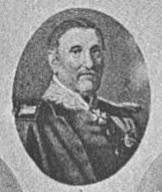 Hugo von Bosch (1782-1865), geadelter bayerischer Generalleutnant